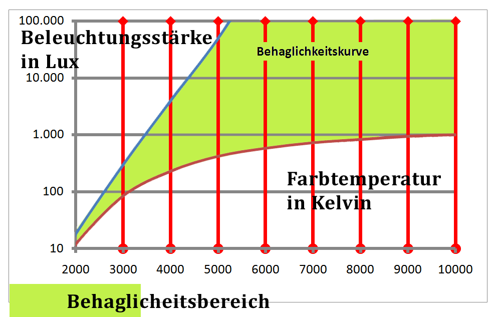 Die erforderliche Beleuchtungsstärke in Lux ist in ihrer subjektiven Wirkung abhängig von der Lichtfarbe, hier als Farbtemperatur in Kelvin angegeben. Der Bereich eines behaglichen Lichtes ist markiert, hier nach Buschendorf. Bläuliche Beleuchtung entsprechend dem Tageslicht erfordert höhere Lichtmengen. Zu niedrige Mengen entsprechen dem subjektiven Eindruck des "Mondlichtes".